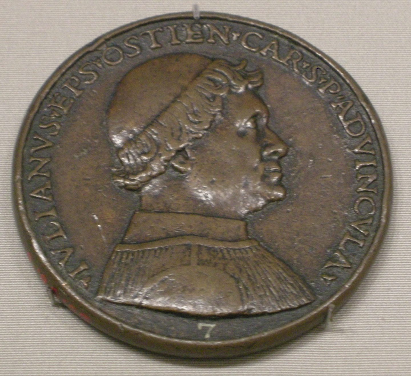 Medaglia di giuliano della rovere, 1495 circa